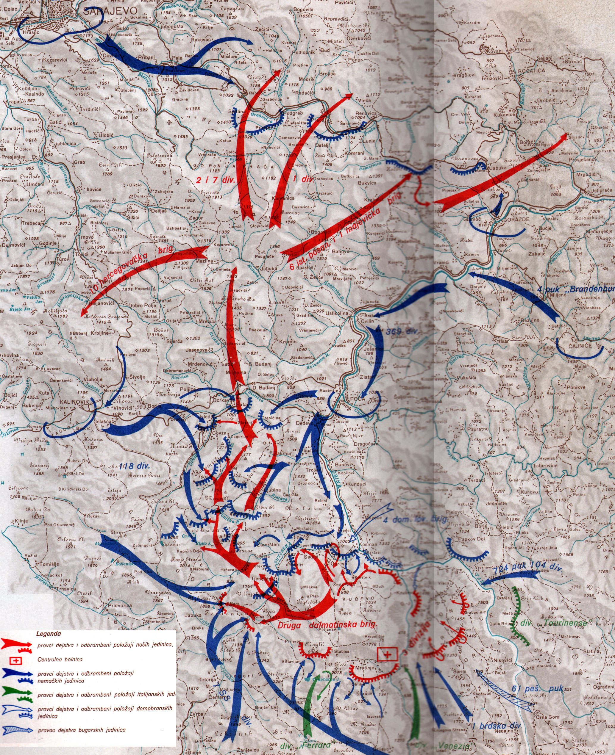 Srpskohrvatski / српскохрватски: Proboj iz okruženja u petoj neprijateljskoj ofanzivi (od 1 do 25 juna 1943 godine)